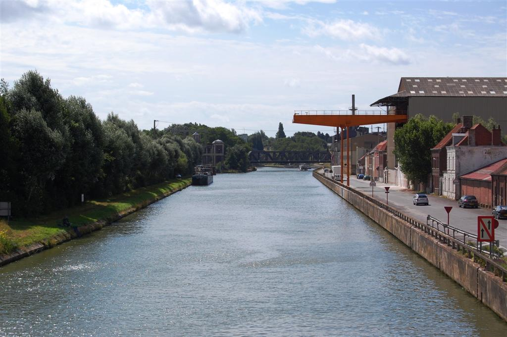 Het Canal-Neufosse te Arque richting sluizen.